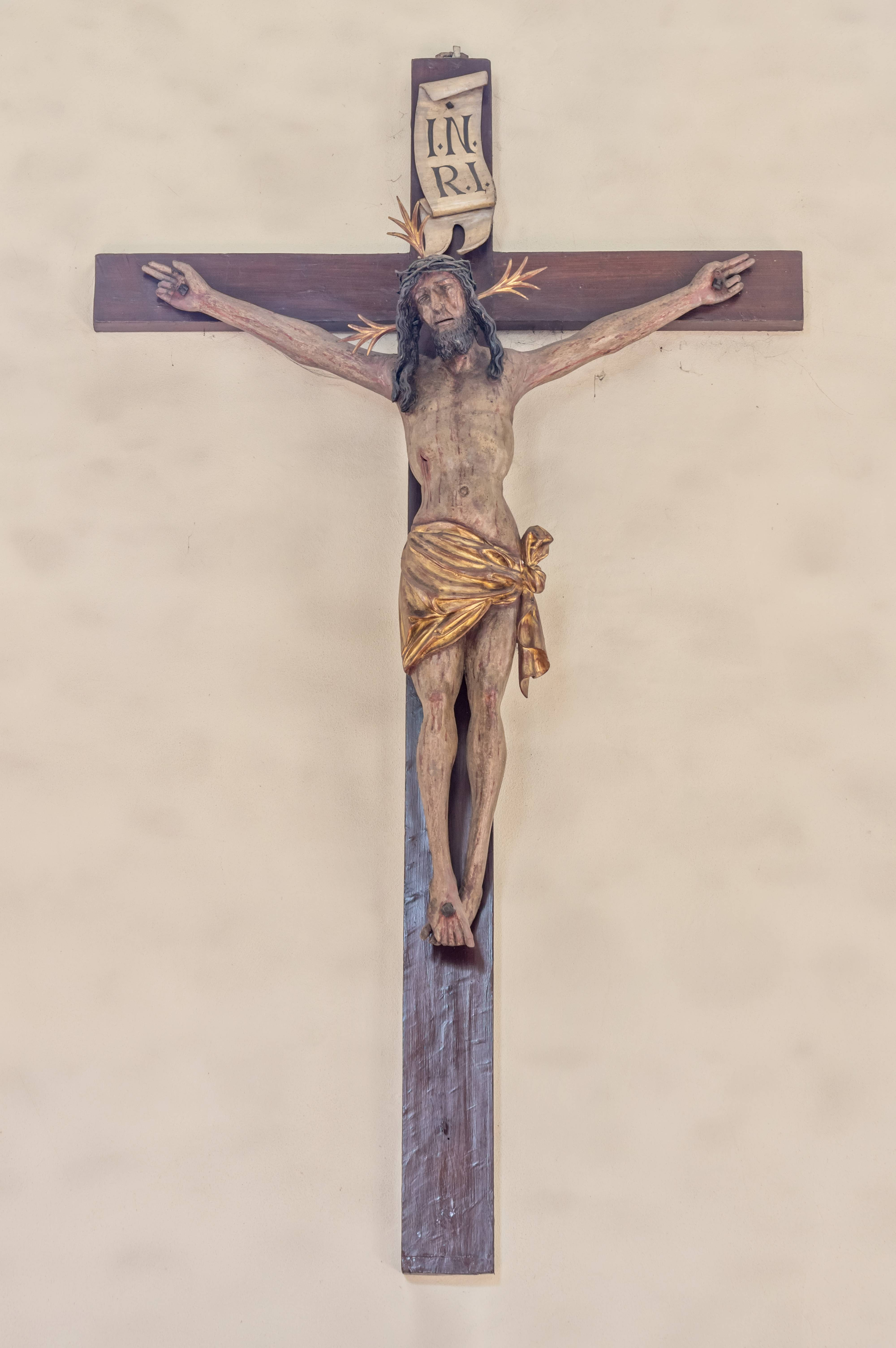 Bilder aus Freiburg von der Kirche St.Peter und Paul in Freiburg Kappel Das ehemalige Chorbofenkreuz, heut ist es an einer Wand des Langhauses angebracht